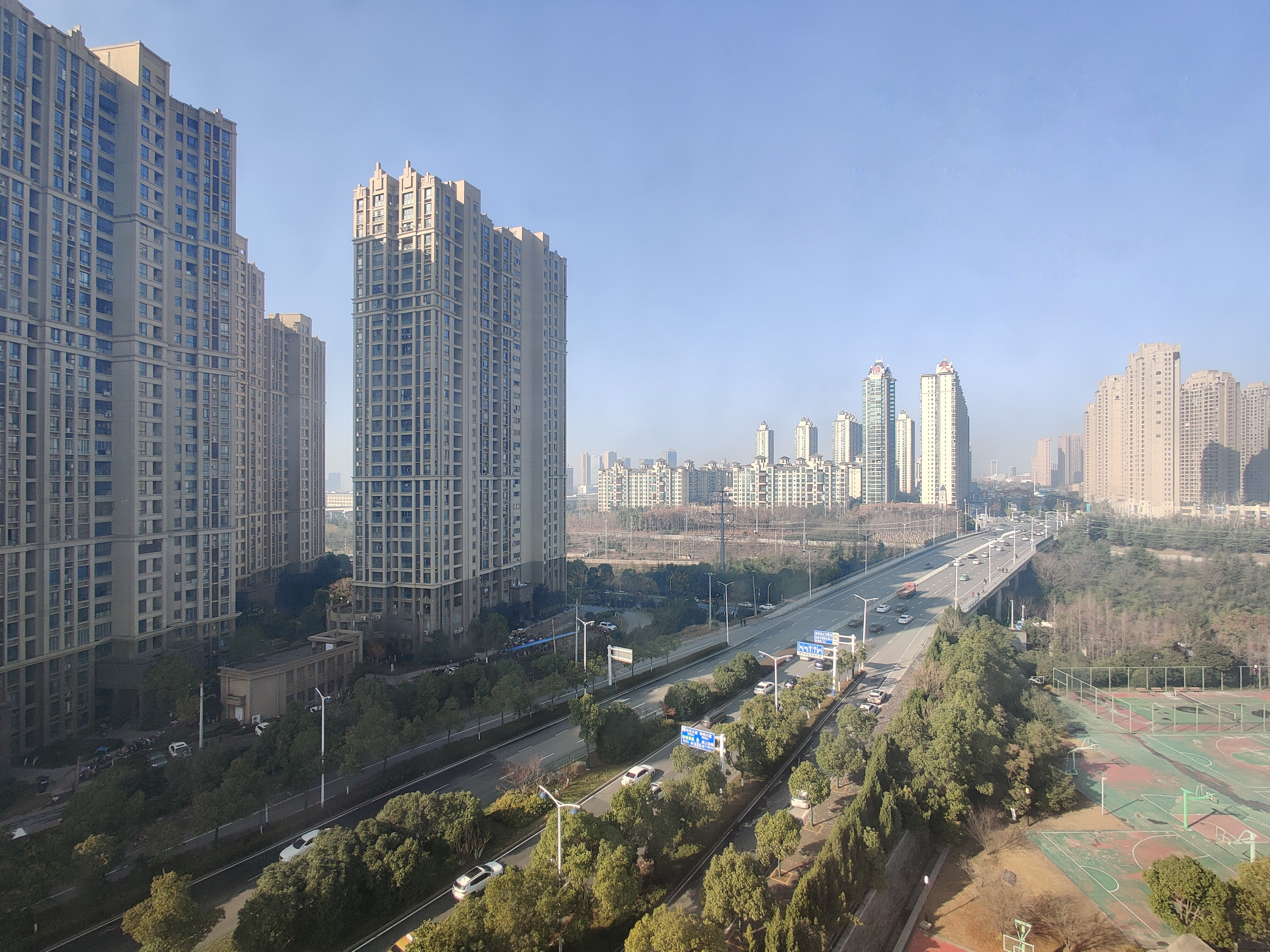 中文（中国大陆）: 安徽省合肥市习友路